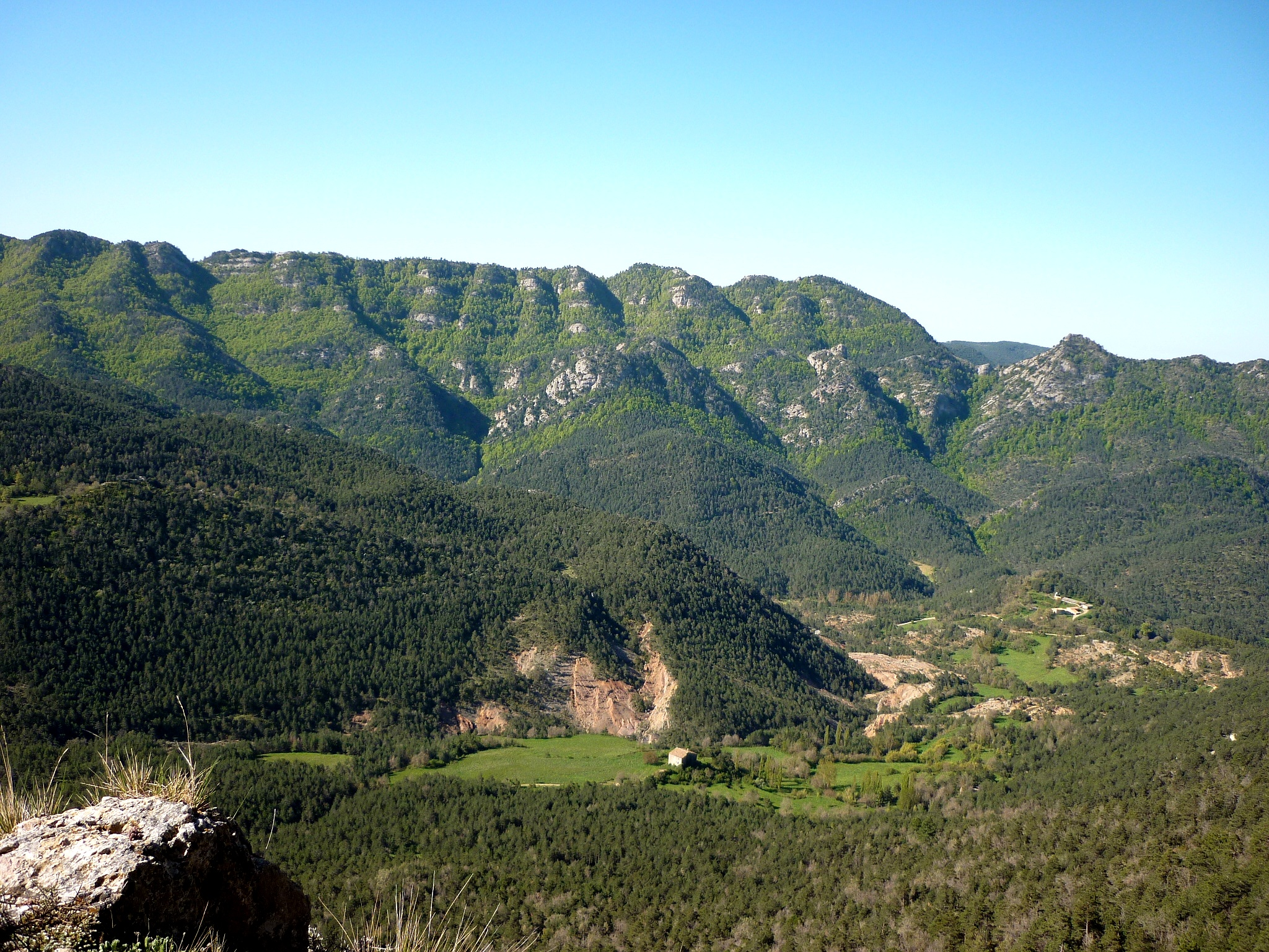 A la baga de la Serra dels Tossals les fulles tendres dels faigs hi tracen unes curioses franges de verd clar. Capolat (Berguedà - Catalunya). Foto presa des del Grau de l'Olivell